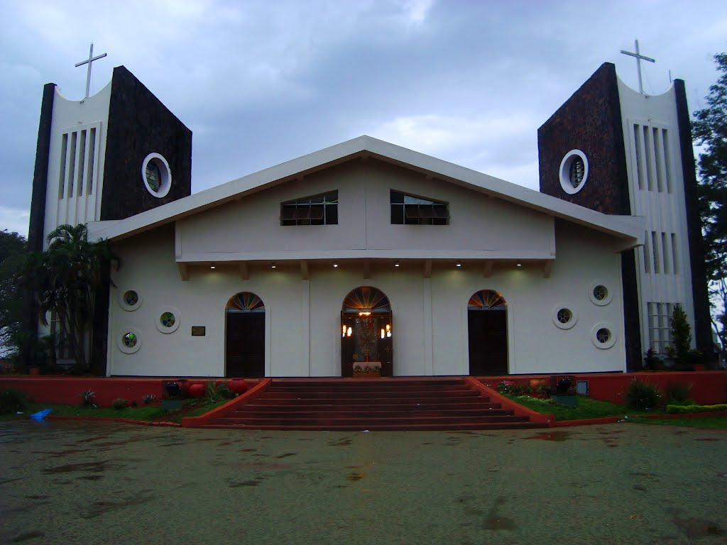 Catedral de Ciudad del Este